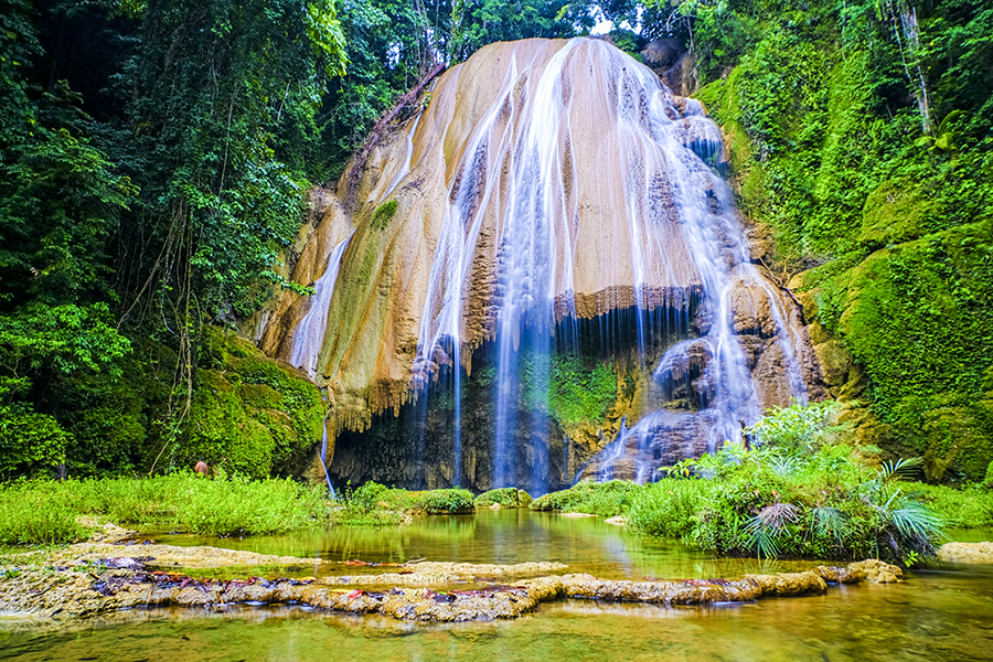 air terjun tumburano adalah air terjun yang berada di daerah Wawonii. Wawonii adalah daerah yang ada di Kabupaten Konawe Kepulauan-Sulawesi Tenggara.